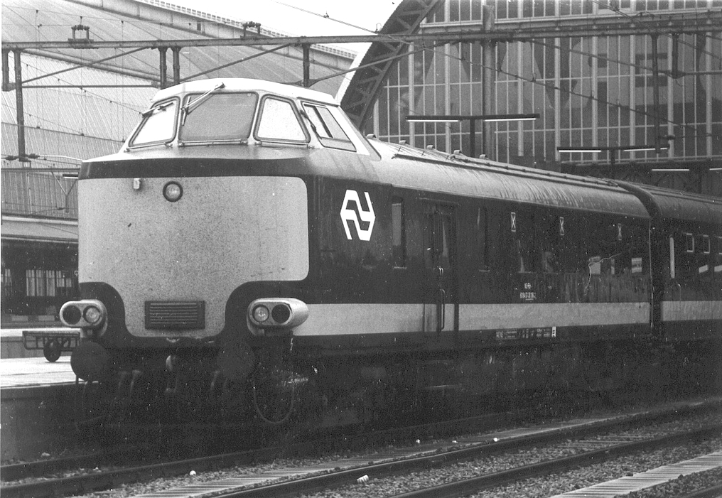 WRD Asd